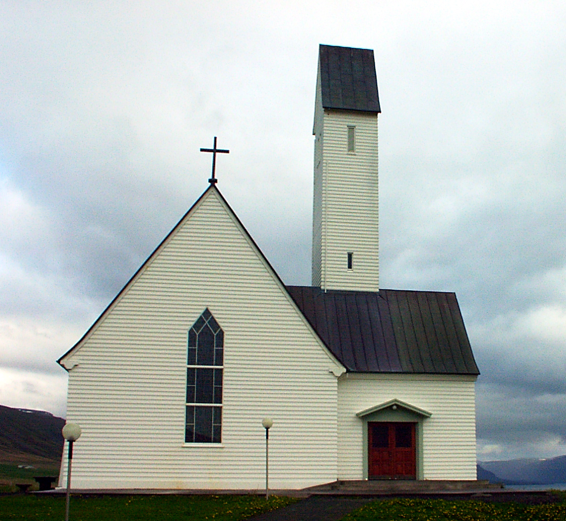 Hallgrímskirkja í Saurbæ (Hvalfjörður): Kirkjan er reist af íslensku þjoðinni til minningar um sr. Hallgrím Pétursson. Vigð varð hún 28.7.1957. Arkitektanir voru Sigurður Guðmundson og Eiríkur Einarsson.